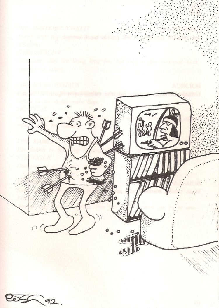 Karikatura objavljena u knjizi Uvrnuti rječnik (1993.). Autor Vinko Pejić.